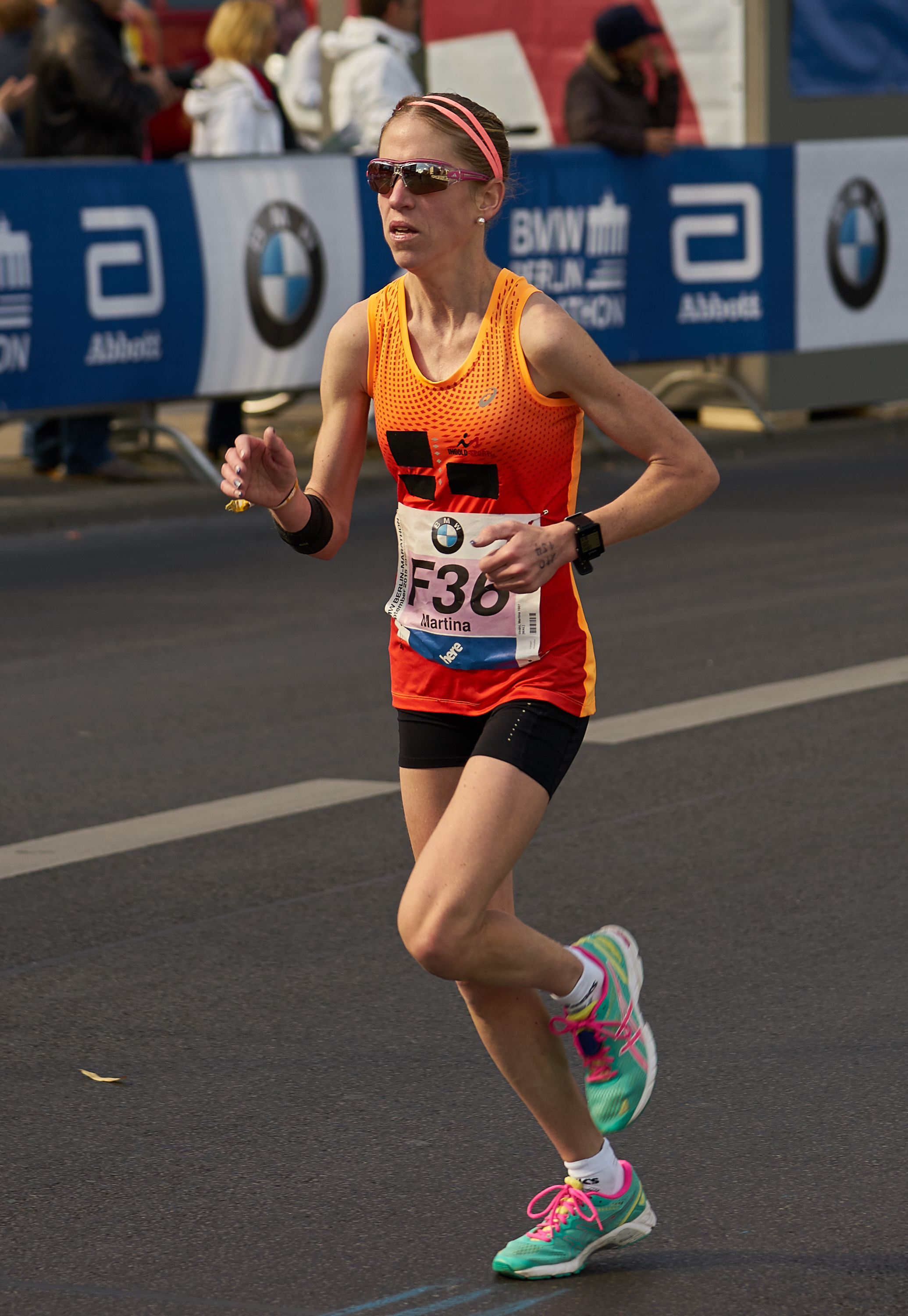 Berlin Marathon 2015 Strähl, Martina (SUI)